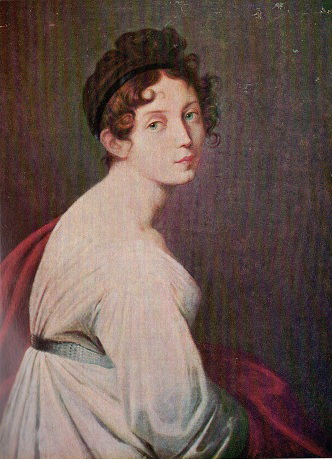 Зинаида Волконская